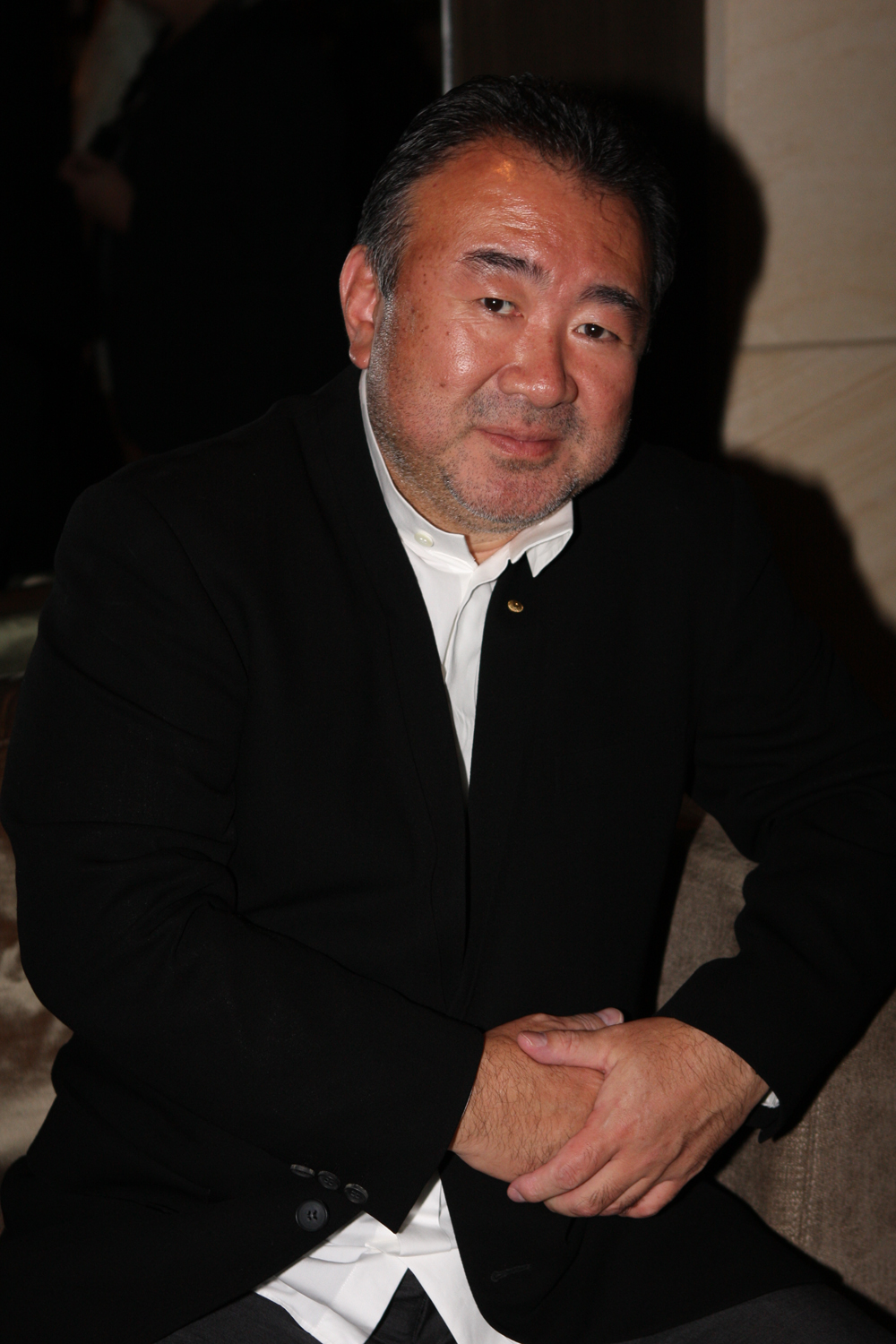 Tetsuya Wakuda